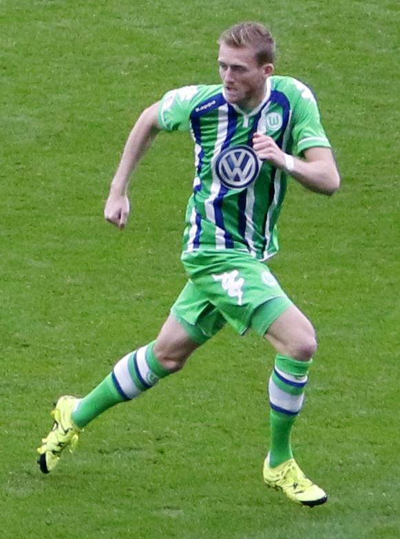 Emirates Cup 2015, Emirates Stadium Héctor Bellerín Santi Cazorla Jeff Reine-Adelaïde Theo Walcott Jack Wilshere Josuha Guilavogui Timm Klose Ricardo Rodríguez André Schürrle Christian Träsch Vieirinha